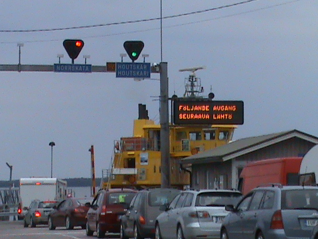 Galtby